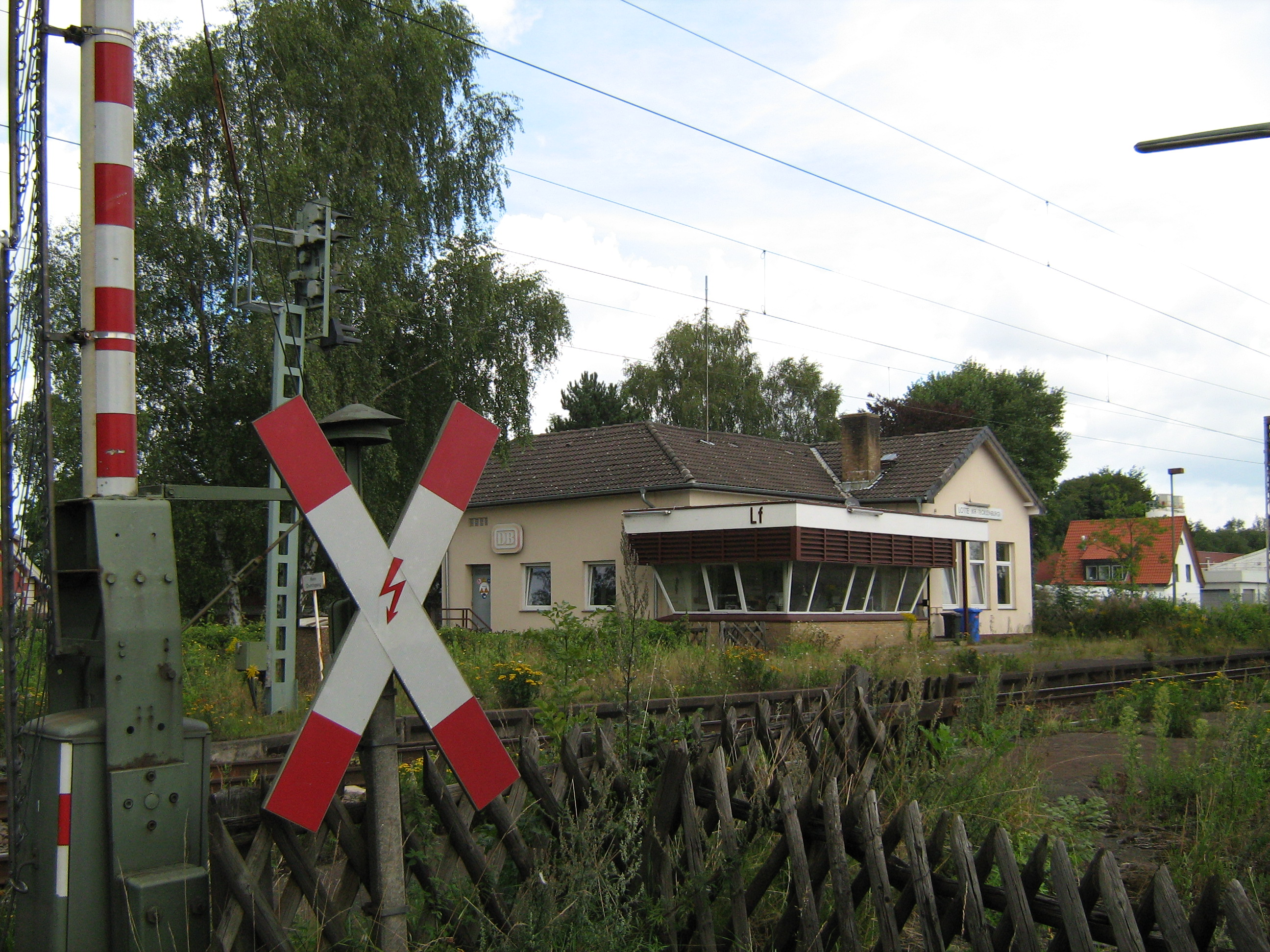 Ehemaliger Bahnhof in Lotte, jetzt nur Stellwerk (NRW im Tecklenburger Land.)